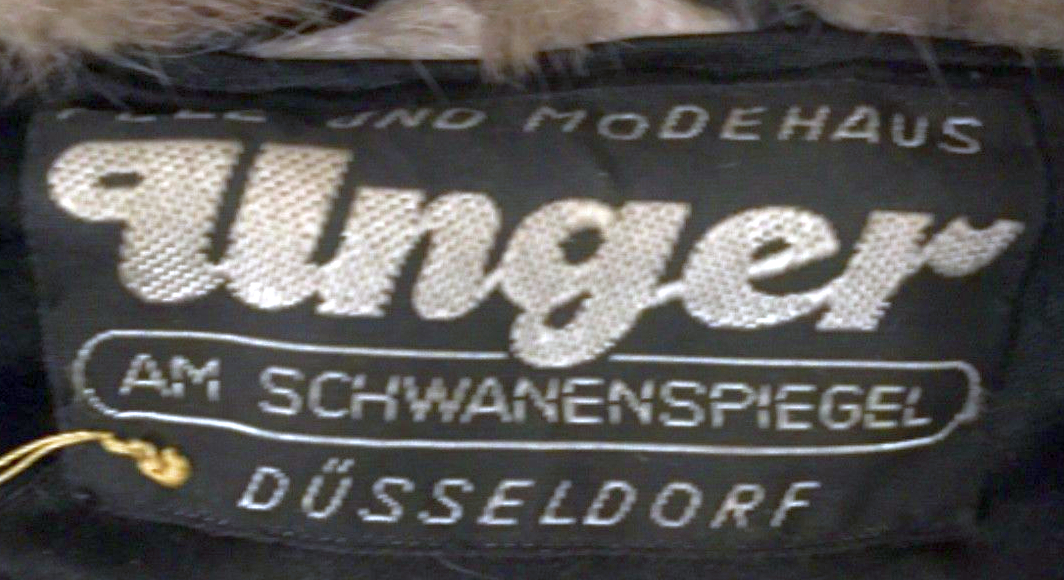 Web-Einnähtikett der Firma Pelz- und Modehaus Unger (Herstellung vor 1999), Düsseldorf, Am Schwanenspiegel.